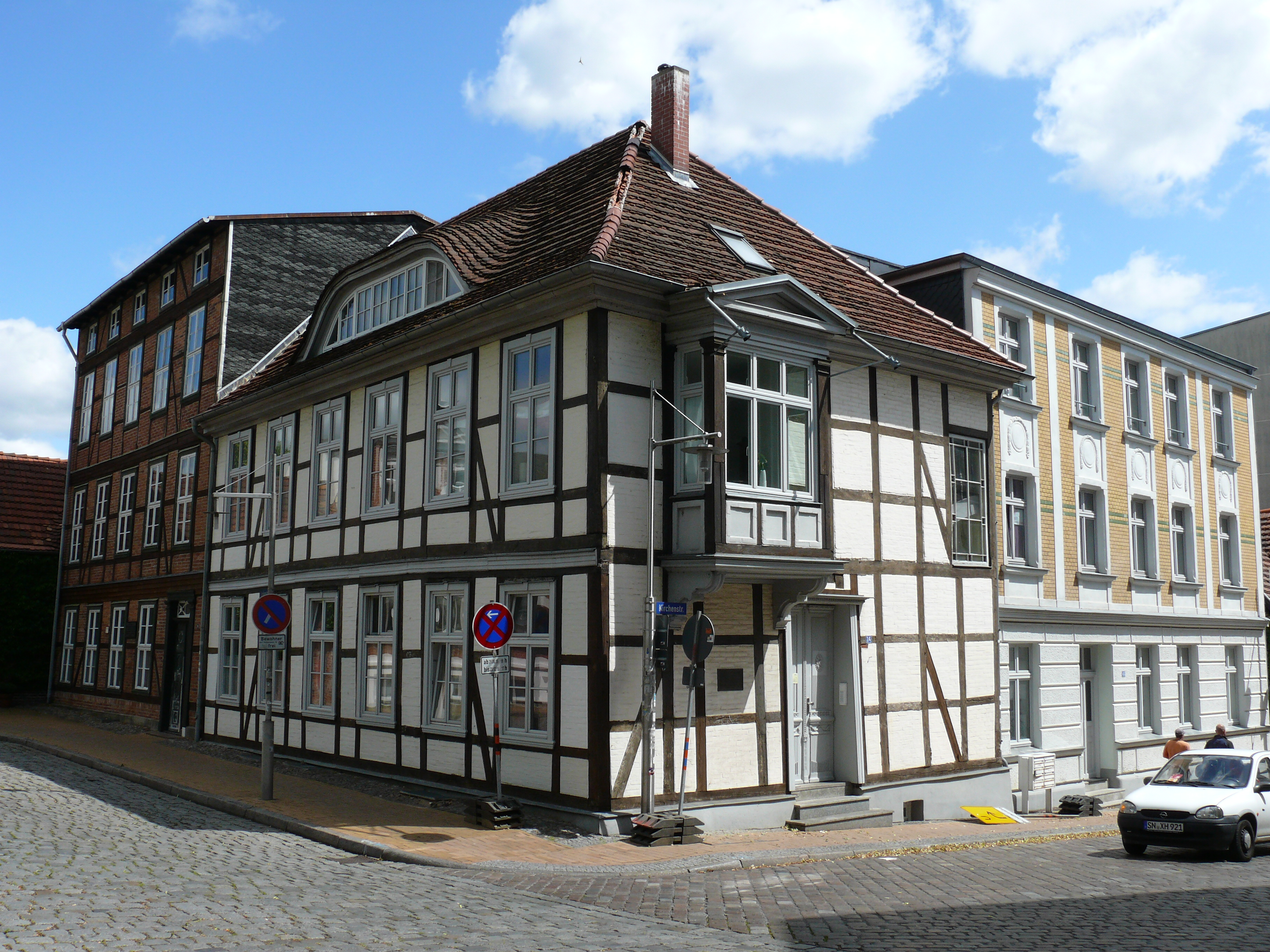 Die Gebäude "Kirchenstraße 2+4" in Schwerin.